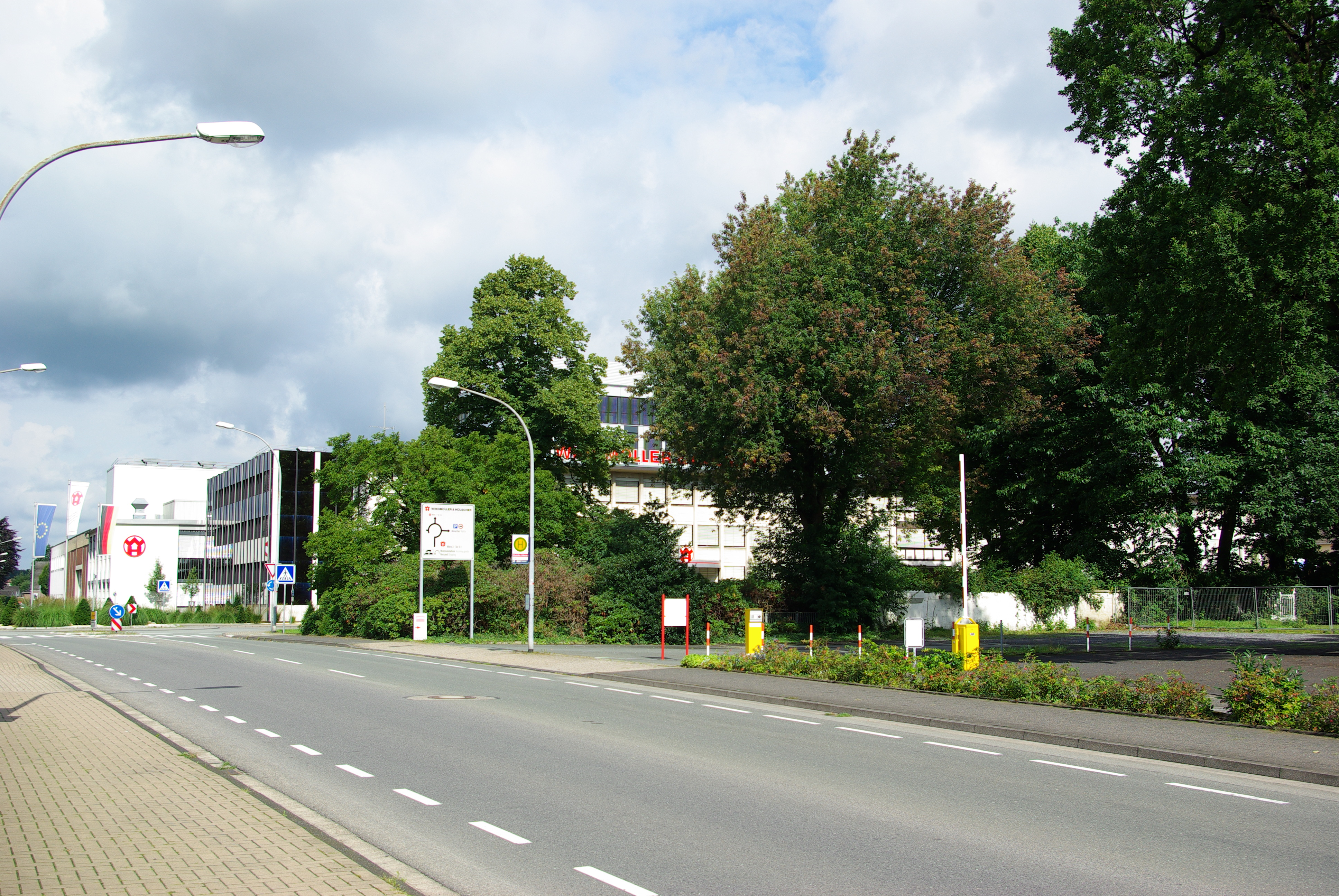 Windmoeller und Hoelscher Werk 1